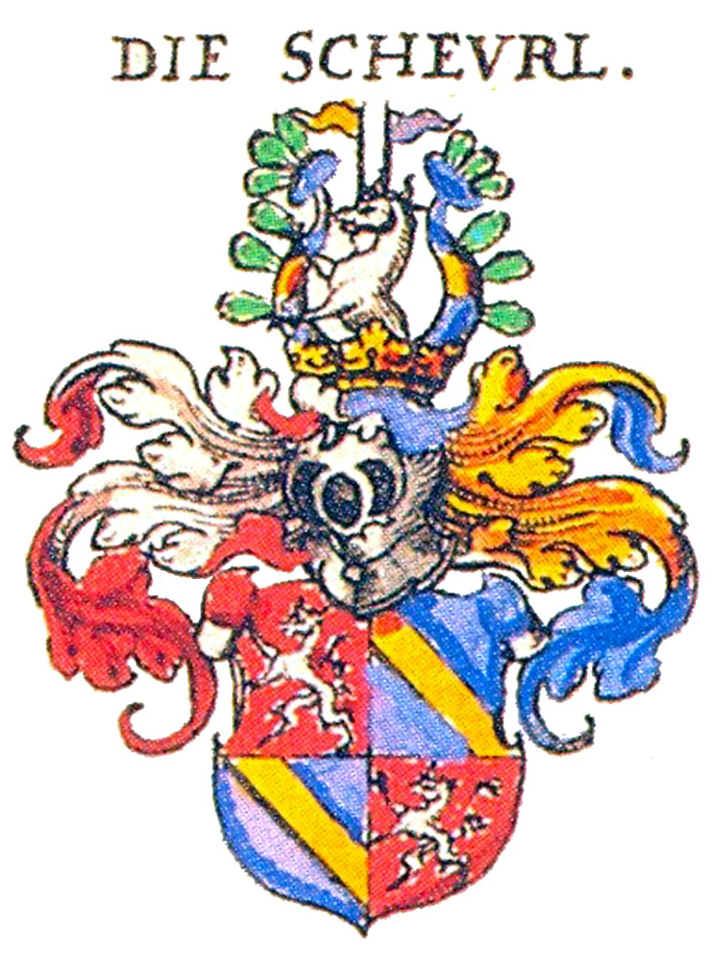 Wappen der Nürnberger ehrbaren Familie und seit 1729 Patrizierfamilie Scheurl von Defersdorf